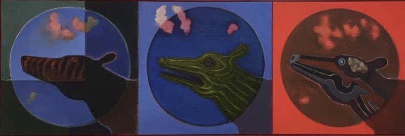 Maleri av den norske maleren Bjørn Krogstad: Olje på lerret 2017